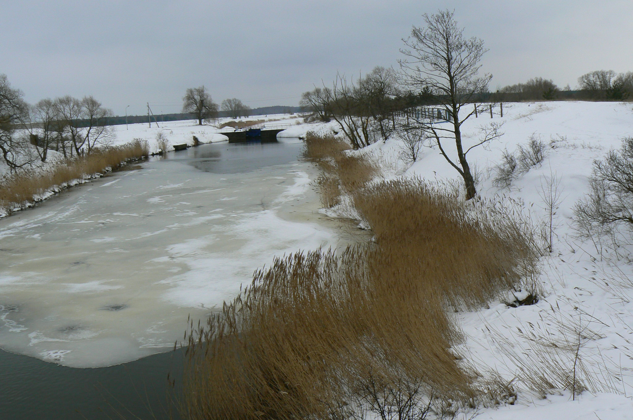 Canal Guillaume Česky: Vilémův kanál v zimě. Již nepoužívané zdymadlo.